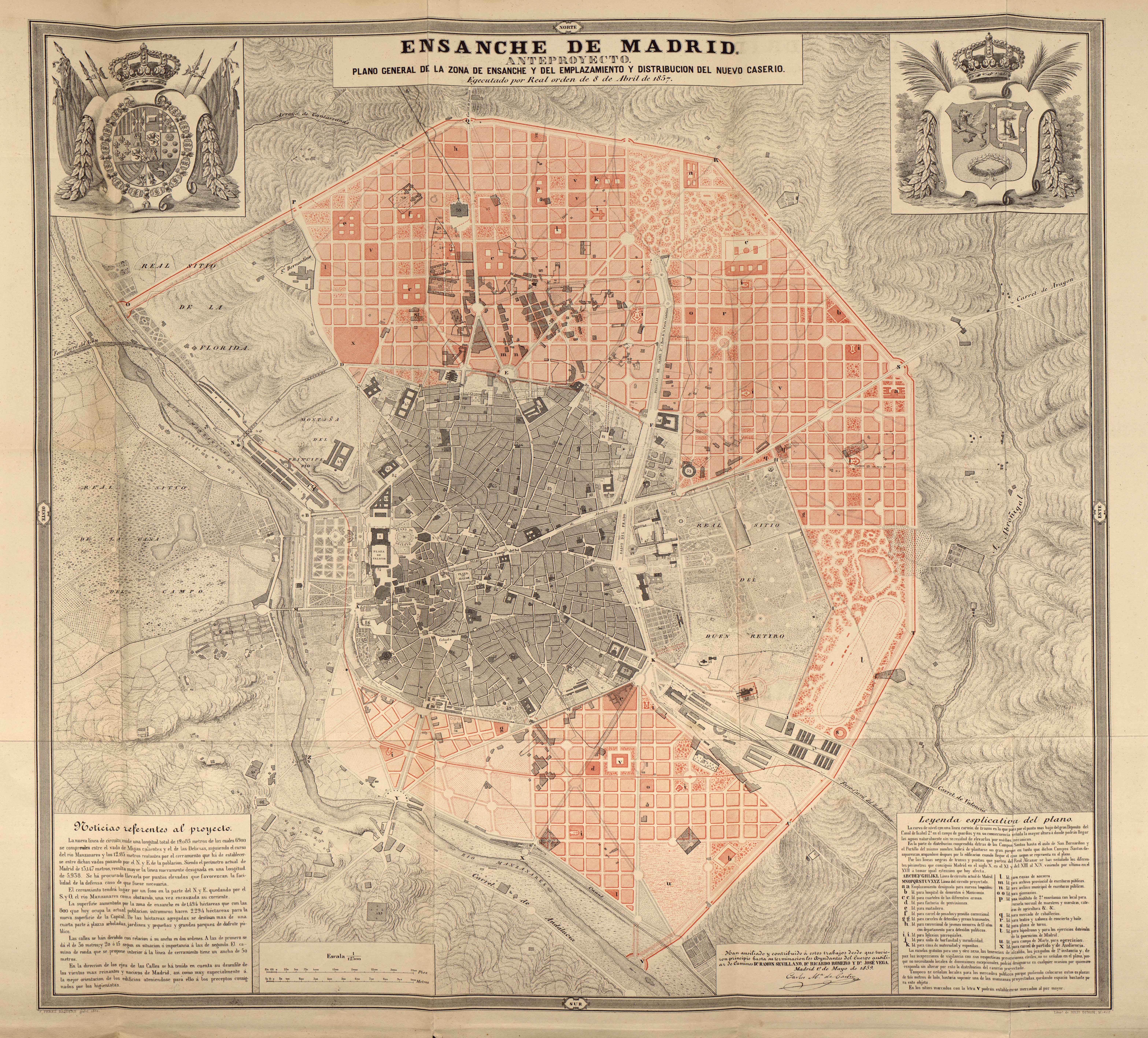 Ensanche de Madrid, anteproyecto [Material cartográfico] : plano general de la zona del Ensanche y del emplazamiento y distribución del nuevo caserío, egecutado por Real orden de 8 de Abril de 1857 / Carlos Mª de Castro ; F Pérez Baquero grabó Refleja en color carmín el proyecto de ensanche e incluye a ambos lados, en la parte inferior, leyenda explicativa del plano y notas referentes al proyecto. En ángulo superior izquierdo escudo Real y en el derecho escudo de Madrid Incluido en: Memoria descriptiva del anteproyecto del ensanche de Madrid : aprobado por Real decreto de 19 de Julio de 1860 / formado por el Inspector de Distrito del Cuerpo de Ingenieros de Caminos, Canales y Puertos D. Carlos María de Castro. Madrid : Imprenta de D. José C. de la Peña, 1860. Escala 1:12.500. 1 plano : col. ; 61 x 61 cmEuskara: Madrilgo Castro zabalgunea, 1857.